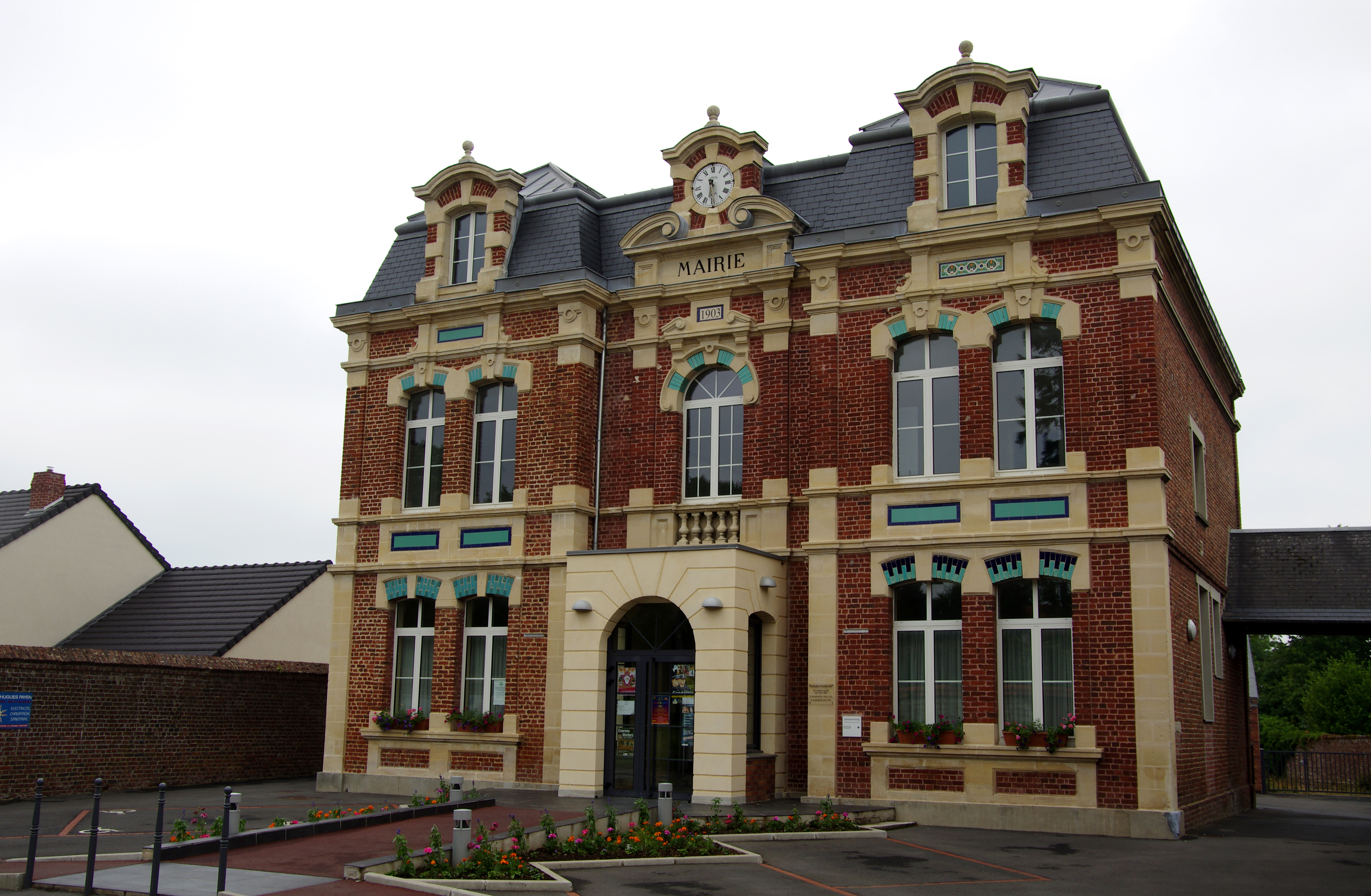 Beaumetz-lès-Loges (Pas-de-Calais, France) - La mairie. .